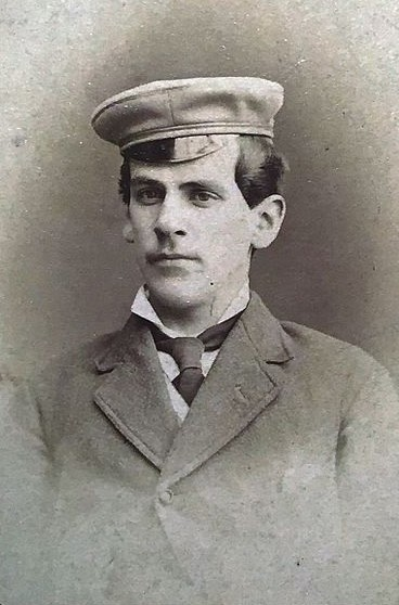 Porträtfotografie von Theodor Christomannos